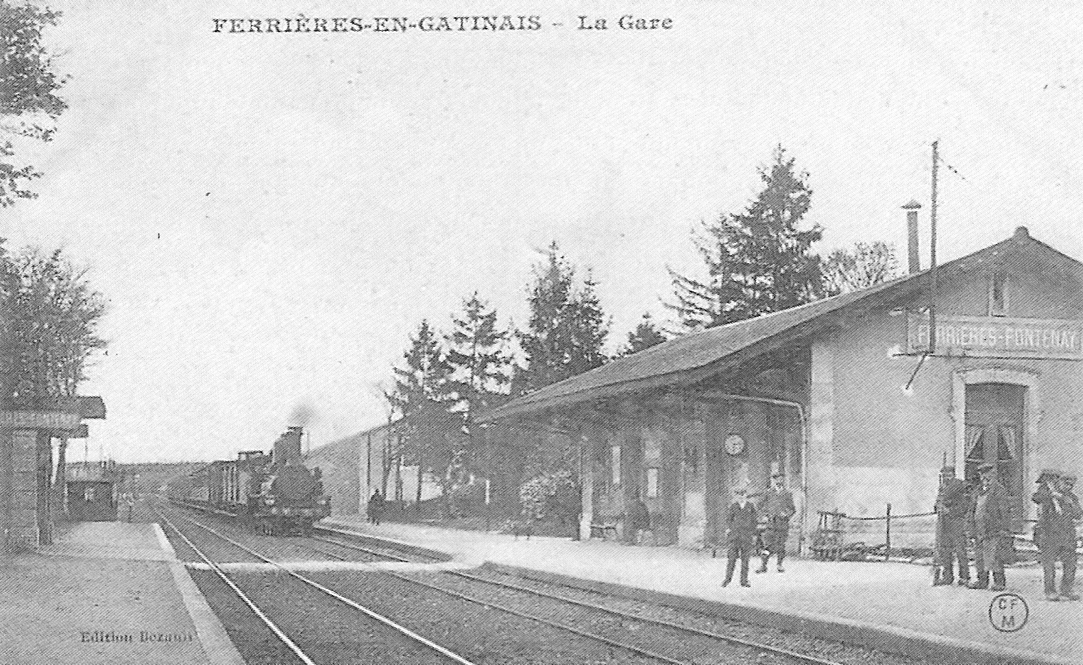 Gare de Ferrières - Fontenay (Loiret, France), au début du XX° siècle.